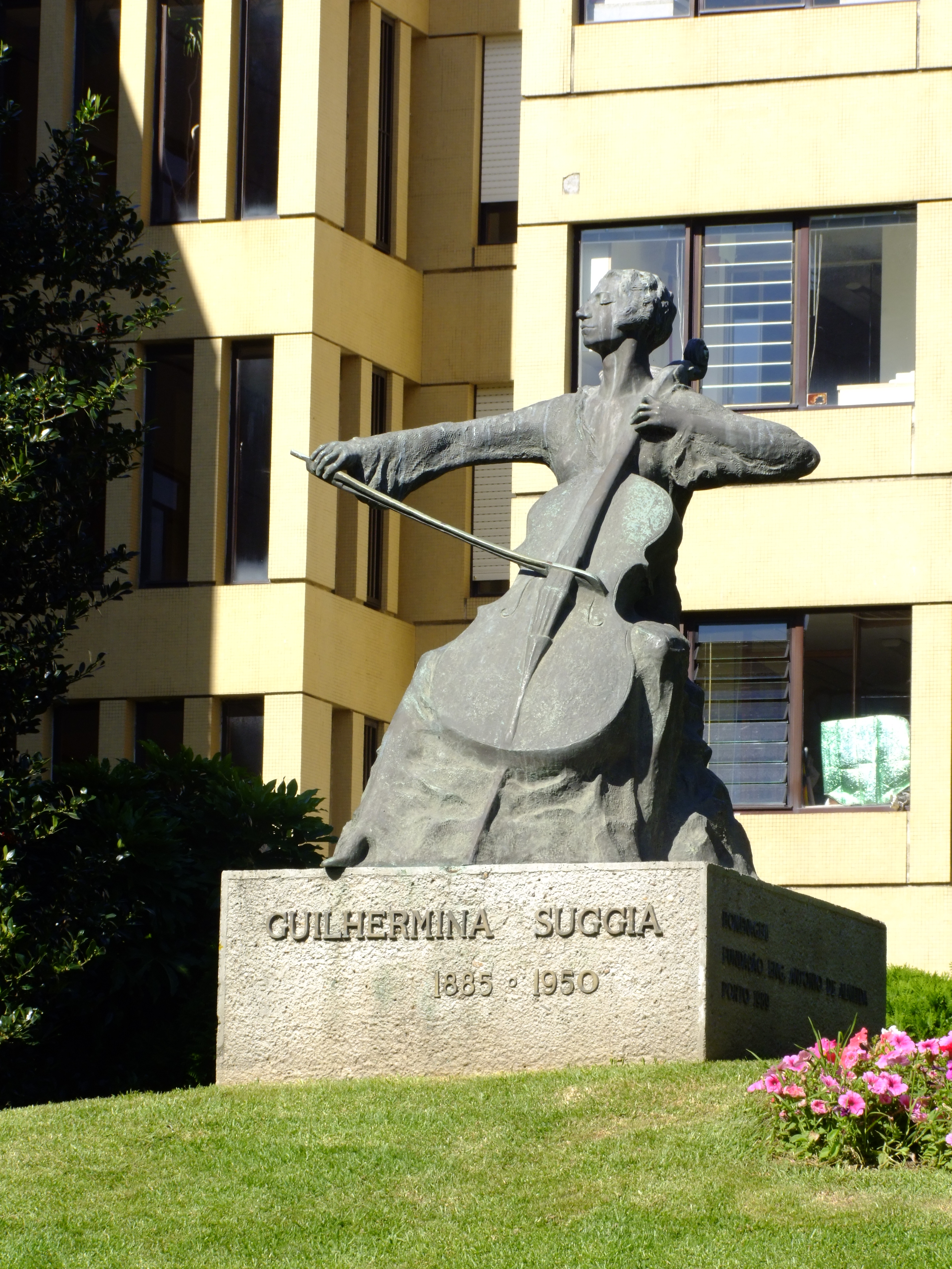 Estátua de Guilhermina Suggia em Ramalde, espaço relvado (condomínio Banco Português de Investimento), Rua do Tenente Valadim. Inaugurada em 07-12-1989 de Irene Vilar.